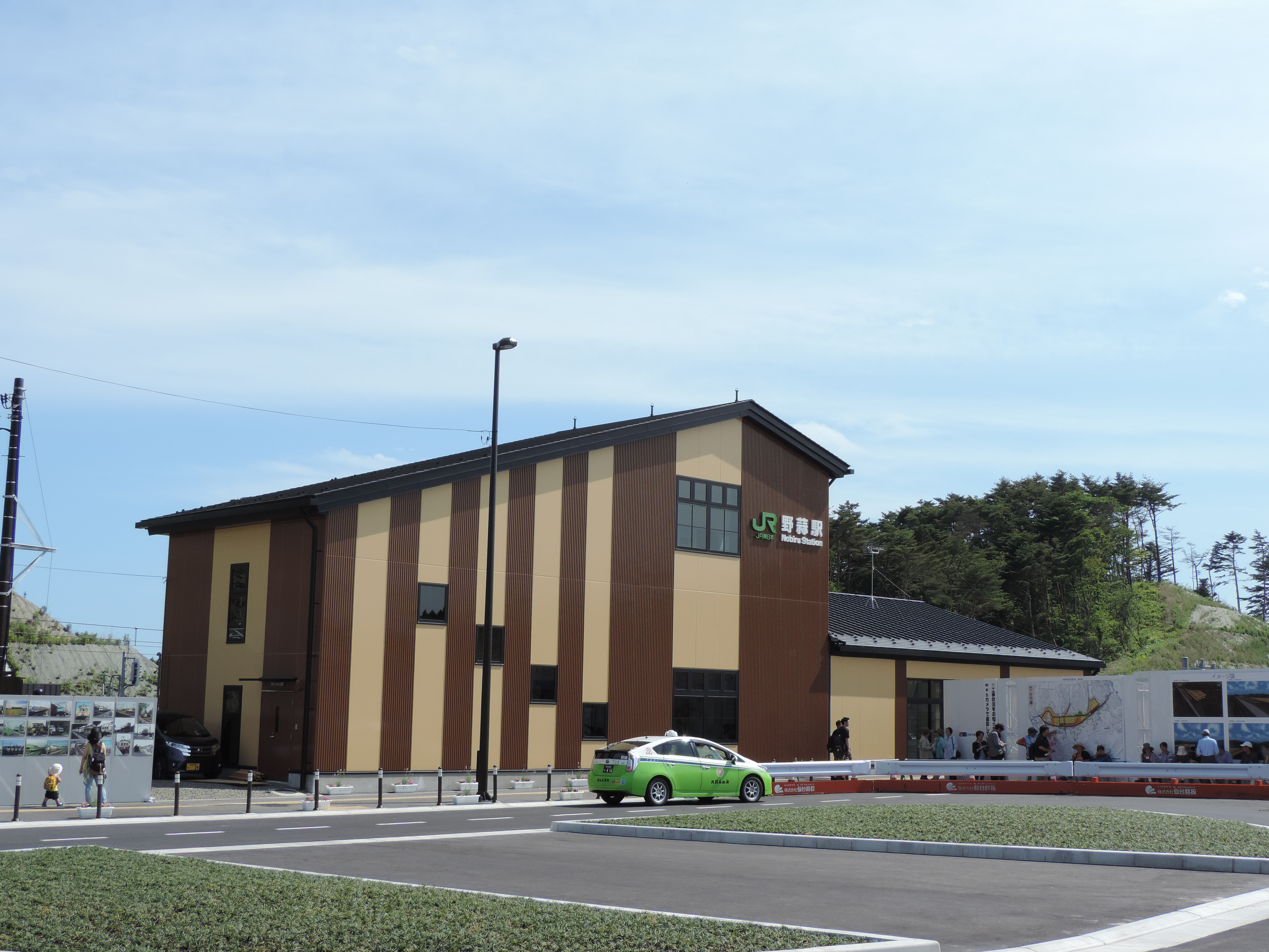 2015年5月30日より使用開始した新駅舎